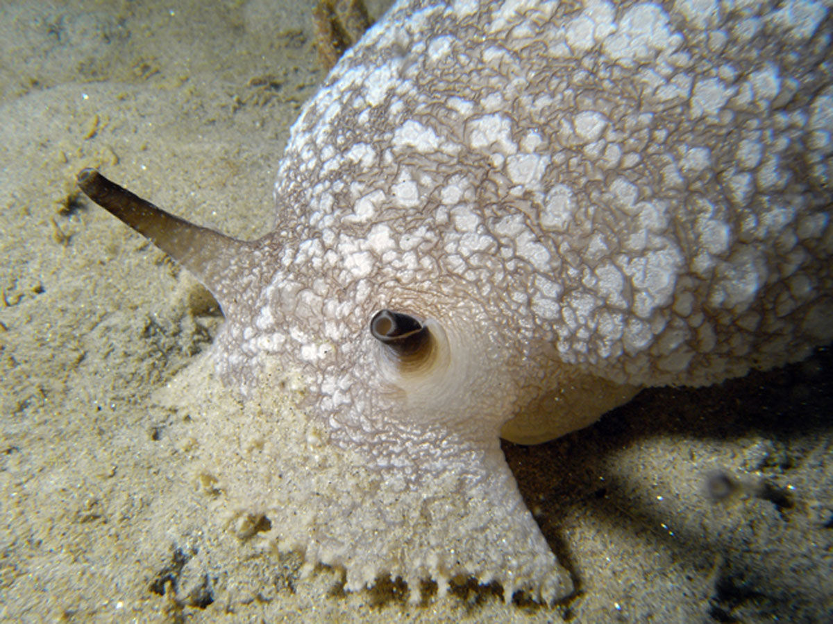 Pleurobranchaea californica. Los rinóforos a menudo son más oscuros y con las puntas negras. Monterey, California.